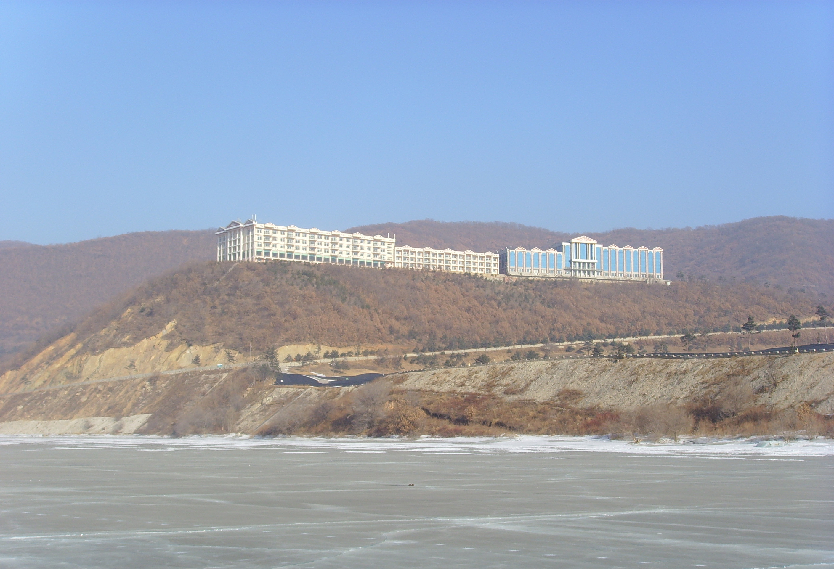 海兰江高尔夫球场 Hailanhu scenic area